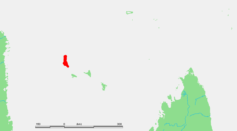 MZ Grande Comore.PNG